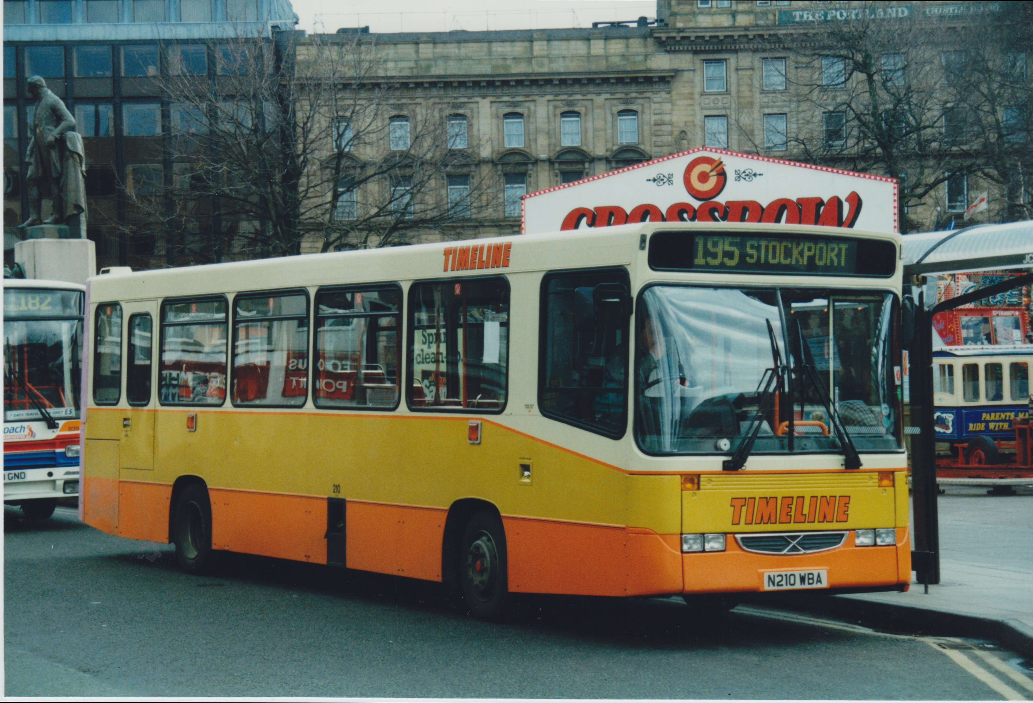 Timeline N210WBA Manchester